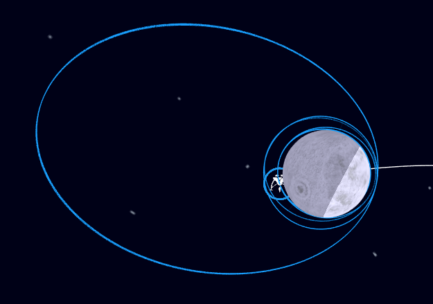 מסלול הגשושית בראשית סביב לירח